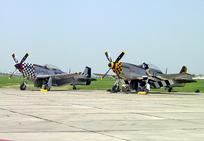 Zwei North American P-51 Mustang (links P-51D-20NA, rechts P-51D-30NT) auf der ILA 2002.